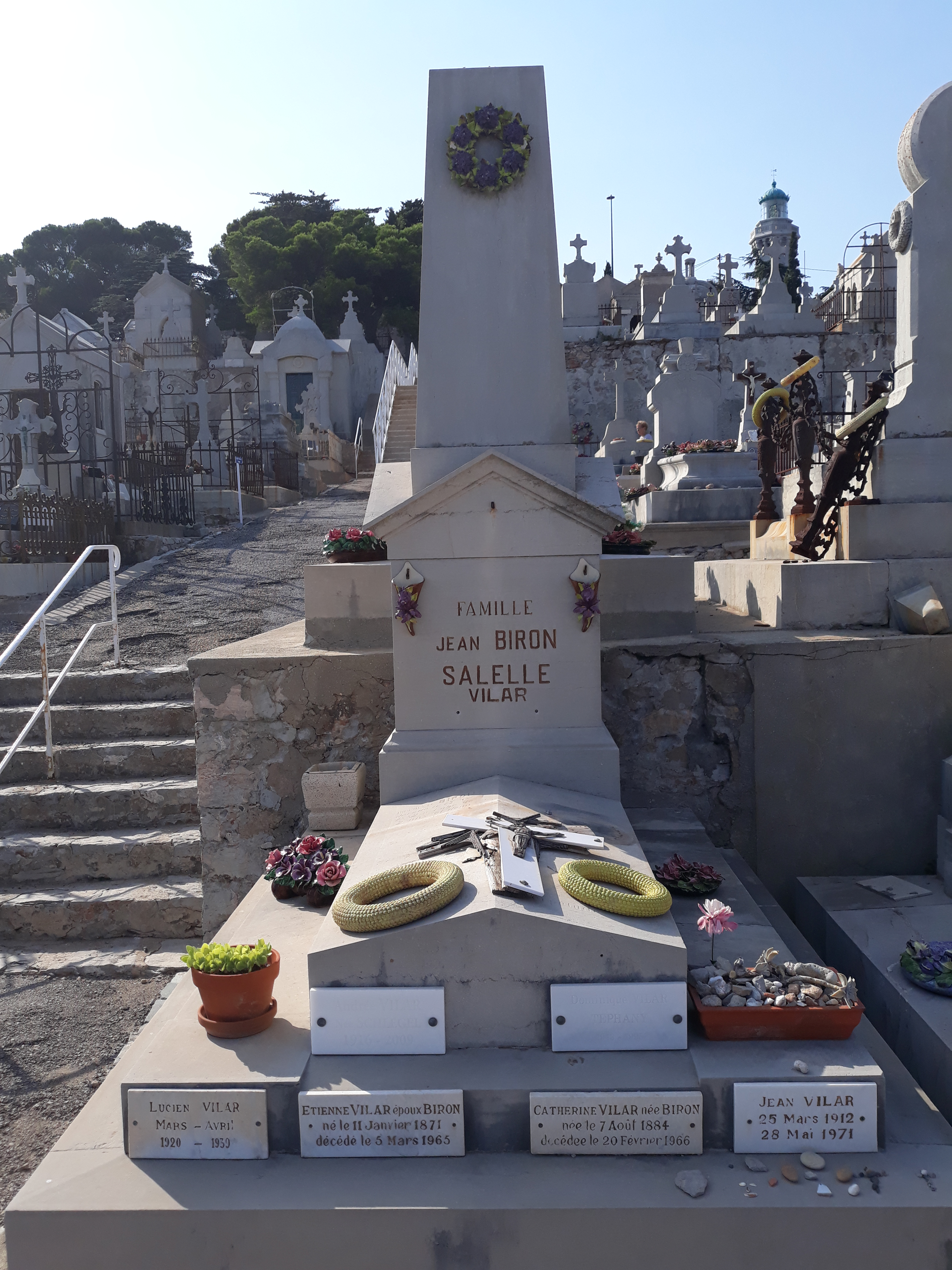 Das Grab des französischen Regisseurs Jean Vilar auf dem Cimetière Marin in Séte (Hérault).